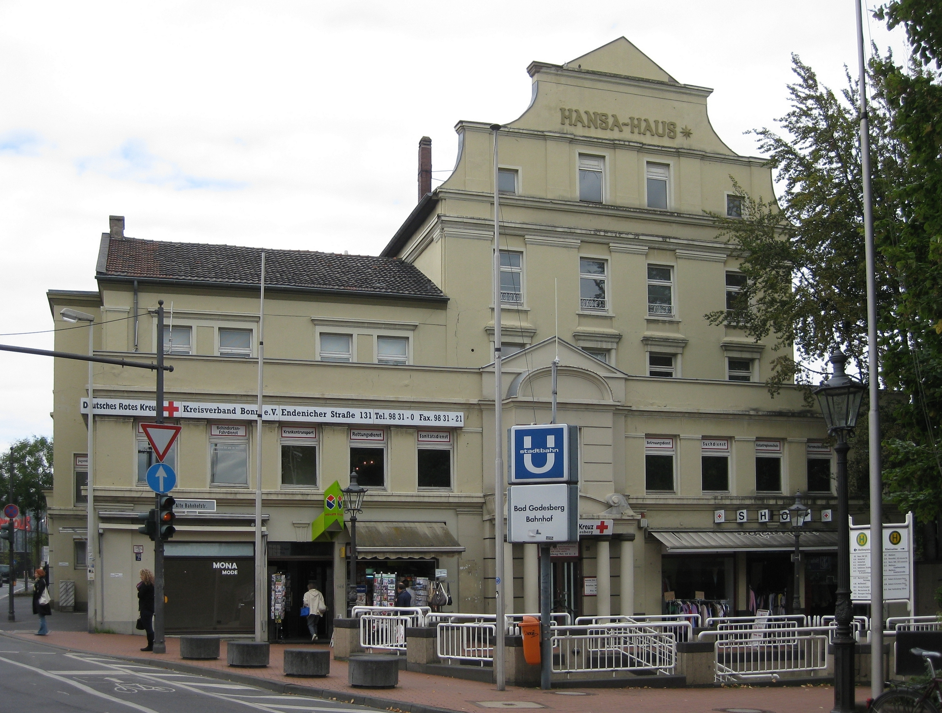 Deutschland, Bonn: Bad Godesberg, Hansahaus (auch mit der Adresse Alte Bahnhofstr. 21, 53175 Bonn). Das „Hansa-Haus“ wurde 1870 als Hotel errichtet. Nach dem Ersten Weltkrieg diente es als „Volksspeisehaus“ und Soldatenheim. 1925 wurde es zu einem Geschäfts- und Bürohaus umgebaut. Bis in die 60er Jahre war dort der Sitz eines Verlages, später einer Diskothek. 1979 wurde es von der Stadt Bonn erworben und u.a. an verschiedene Vereine vermietet. Die Nutzfläche beträgt rund 1800 Quadratmeter.